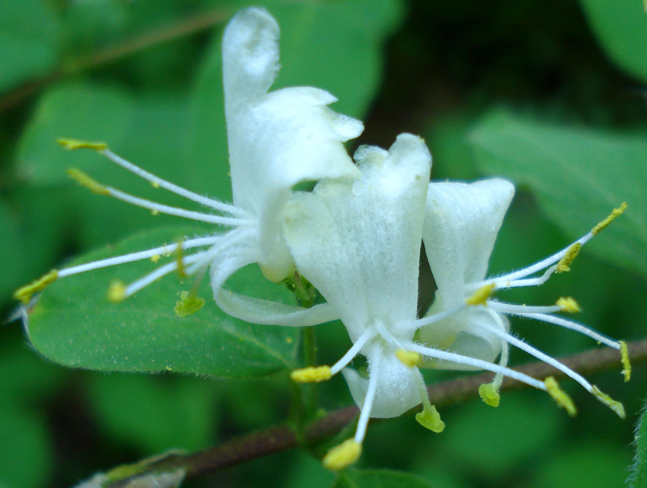 Lonicera xylosteum (Unterfranken, Germany)